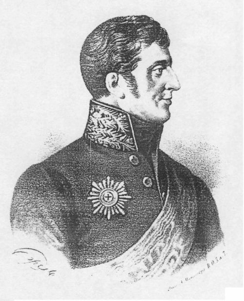 Дерябин Андрей Фёдорович